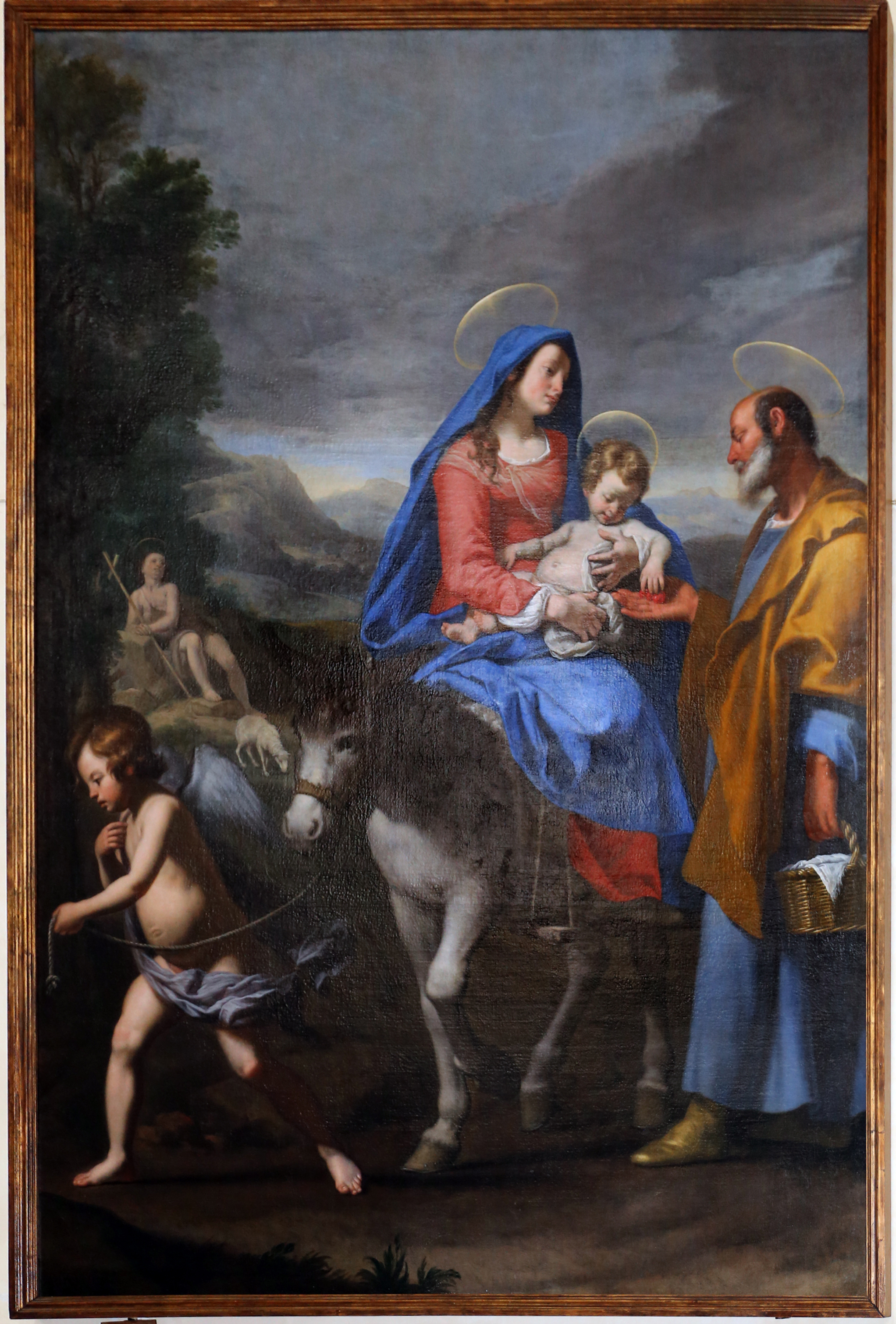 Sant'Agostino (Massa Marittima) This is a photo of a monument which is part of cultural heritage of Italy.